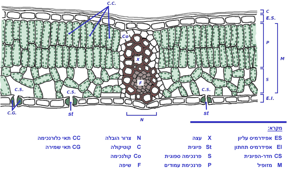 Description איור חתך עלה